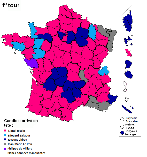 Candidat arrivé en tête du 1er tour des élections présidentielles françaises de 1995, département par département